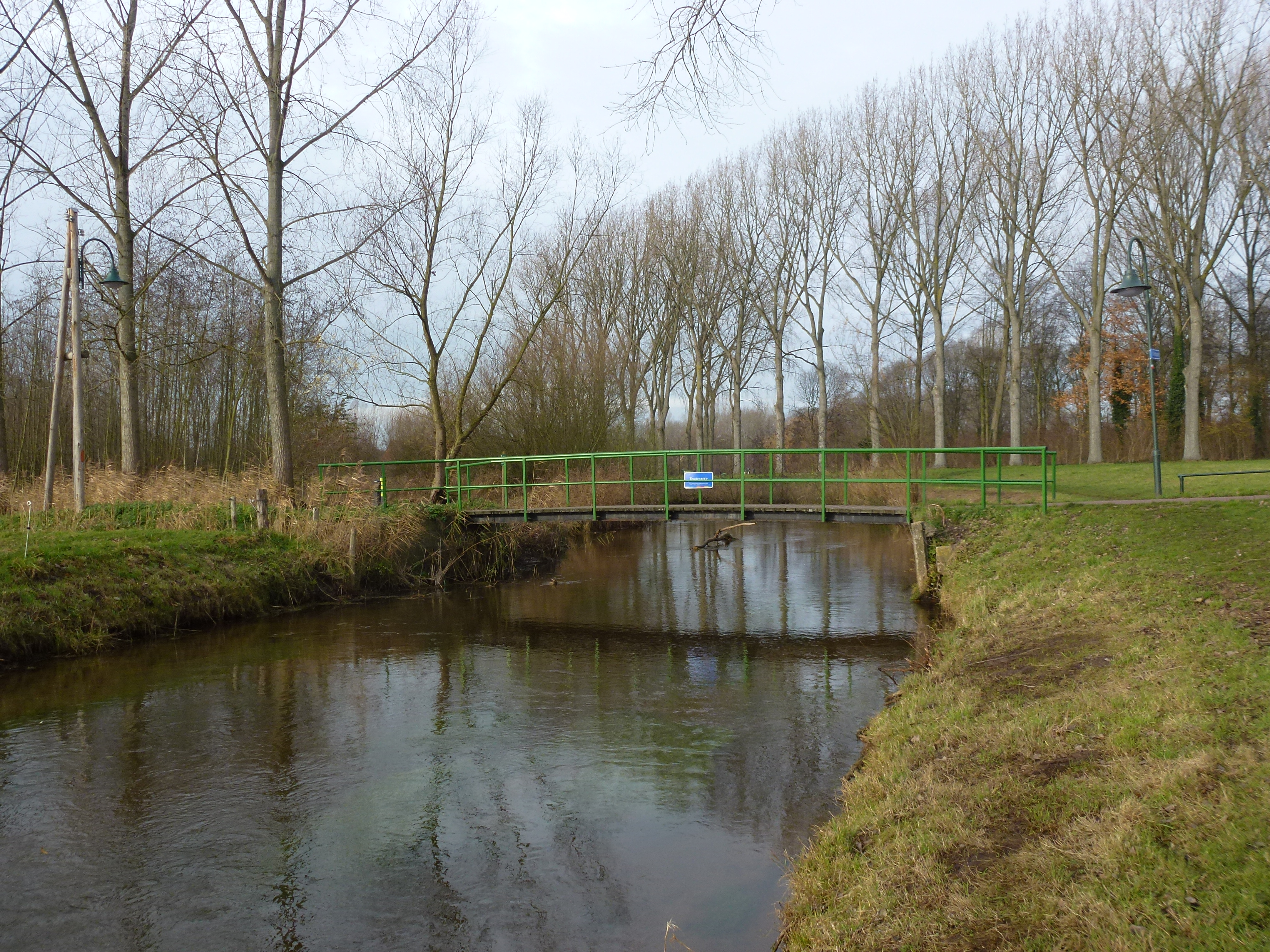 Tongelreep, Eindhoven